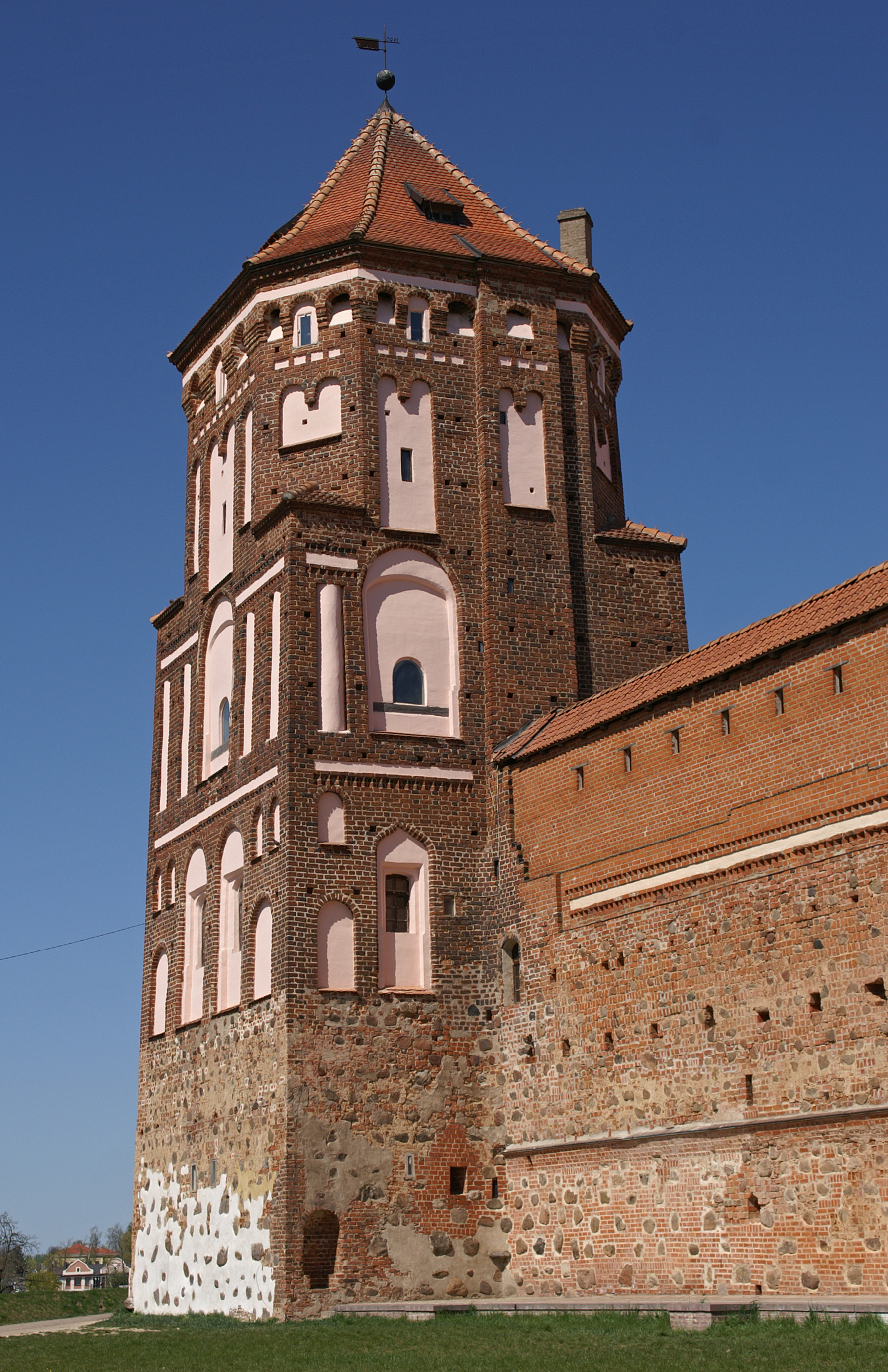 Беларуская (тарашкевіца): Замкавы комплекс «Мір». Будынкі, збудаваньні, пляніровачная структура, ляндшафтныя кампазыцыі, рэшткі земляных абарончых збудаваньняў, элемэнты абвадненьня. г.п. Мір This is a photo of Belarusian heritage monument. Reference number: 410Г000317 ( WLM)